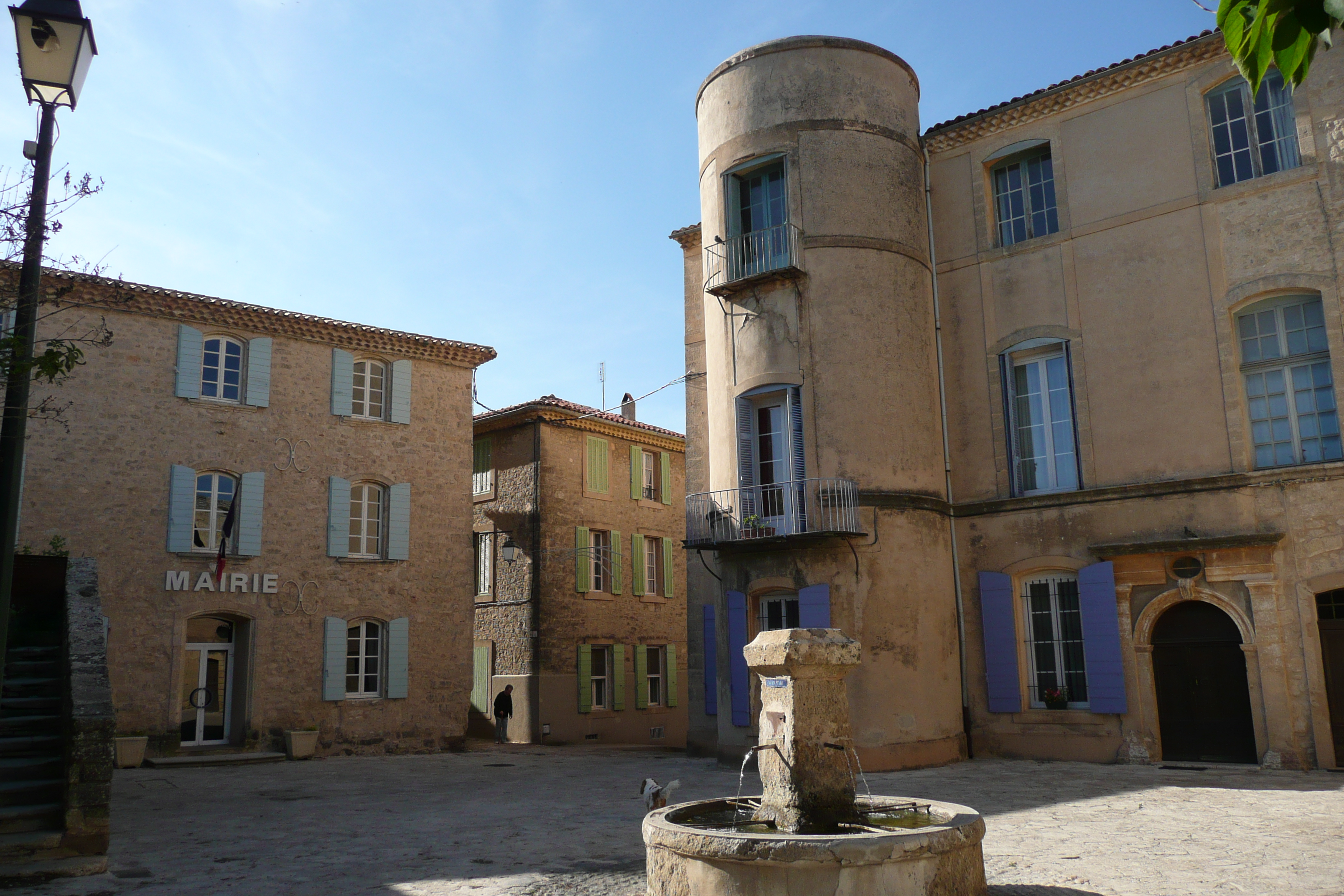 Fontaine, place et mairie à Grambois.